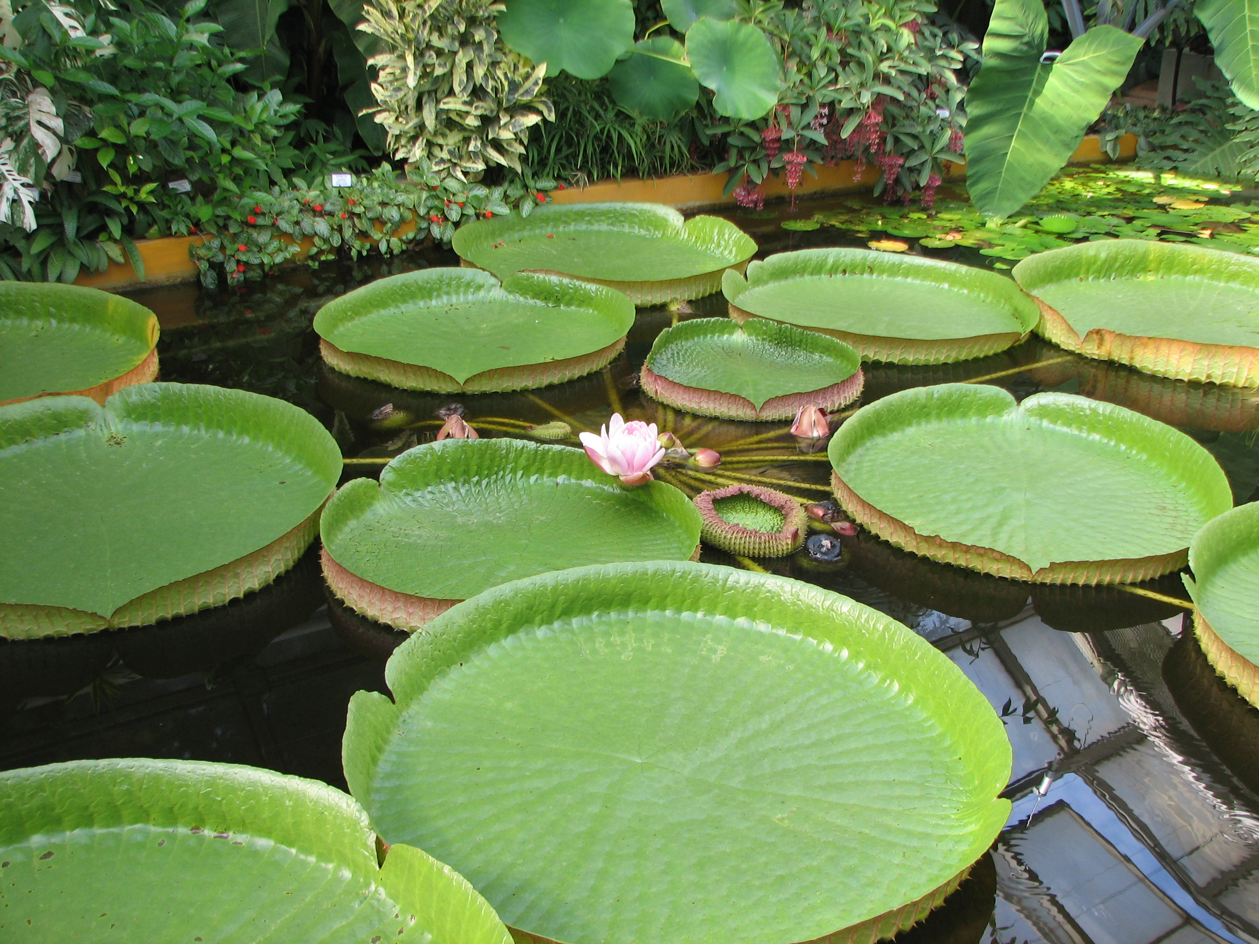 Viktorie královská (Victoria cruziana) (Botanická zahrada PřF MU)